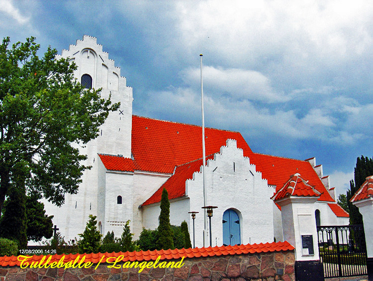 fra sydvest